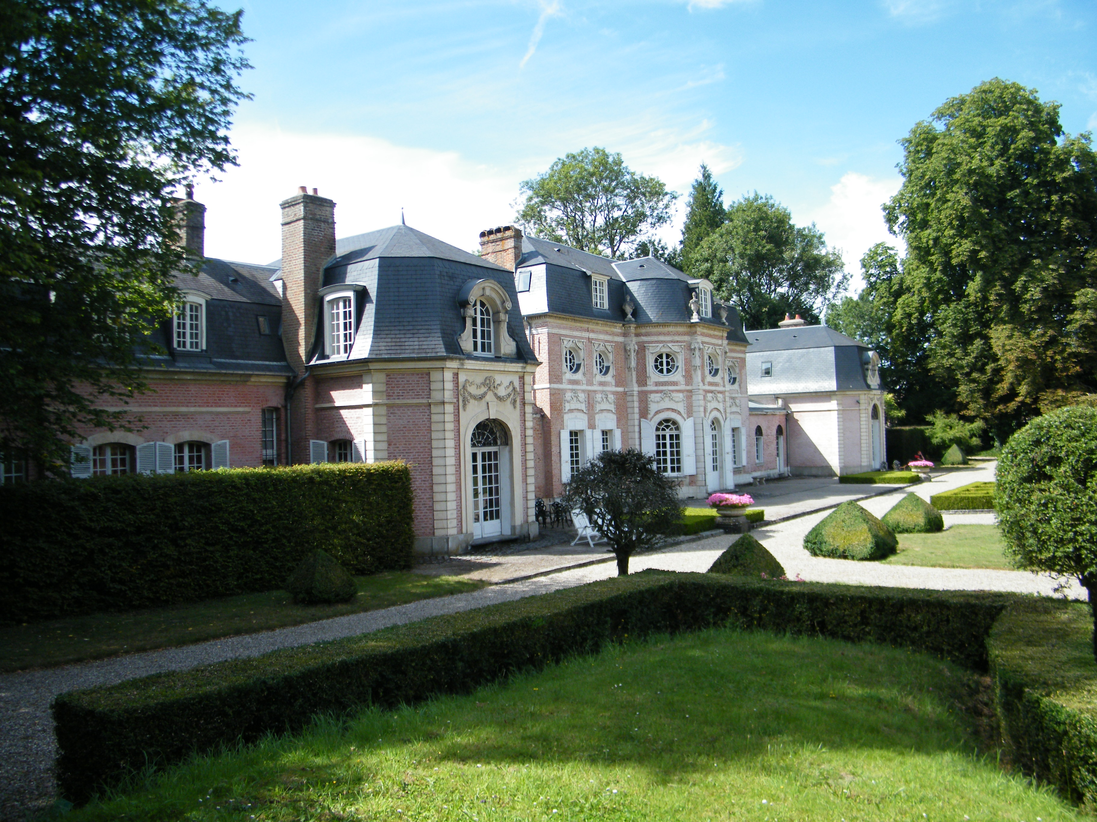 Abbeville, Somme, Fr, Château de Bagatelle (9)